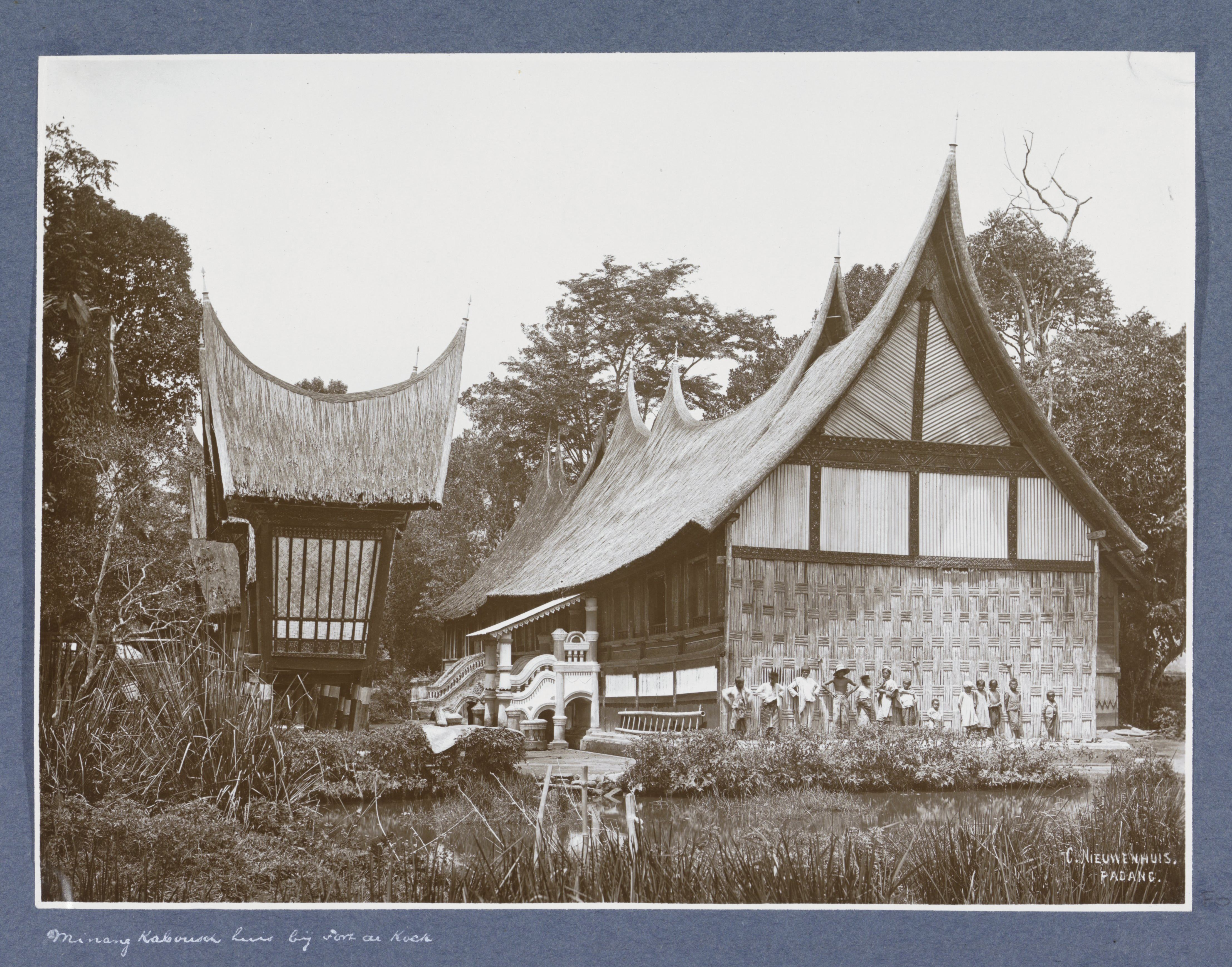 IdentificatieTitel(s): Indische kinderen poserend voor een woonhuis in Minangkabou op SumatraObjecttype: foto albumblad Objectnummer: RP-F-F01149-DDOmschrijving: Onderdeel van Reisalbum met foto's van bedrijvigheid en beziensWaar: digheden op Sumatra en Java en van de reis naar en van Nederlands-Indië.VervaardigingVervaardiger: fotograaf: Christiaan Benjamin NieuwenhuisPlaats vervaardiging: SumatraDatering: ca. 1900 - ca. 1920Fysieke kenmerken: ontwikkelgelatinezilverdrukMateriaal: papier fotopapier Techniek: ontwikkelgelatinezilverdrukAfmetingen: foto: h 212 mm × b 289 mmOnderwerpWat: exterior ~ representation of a buildingfaçade (of house or building)WaarSumatraVerwerving en rechtenVerwerving: overdracht van beheer 1994Copyright: Publiek domein